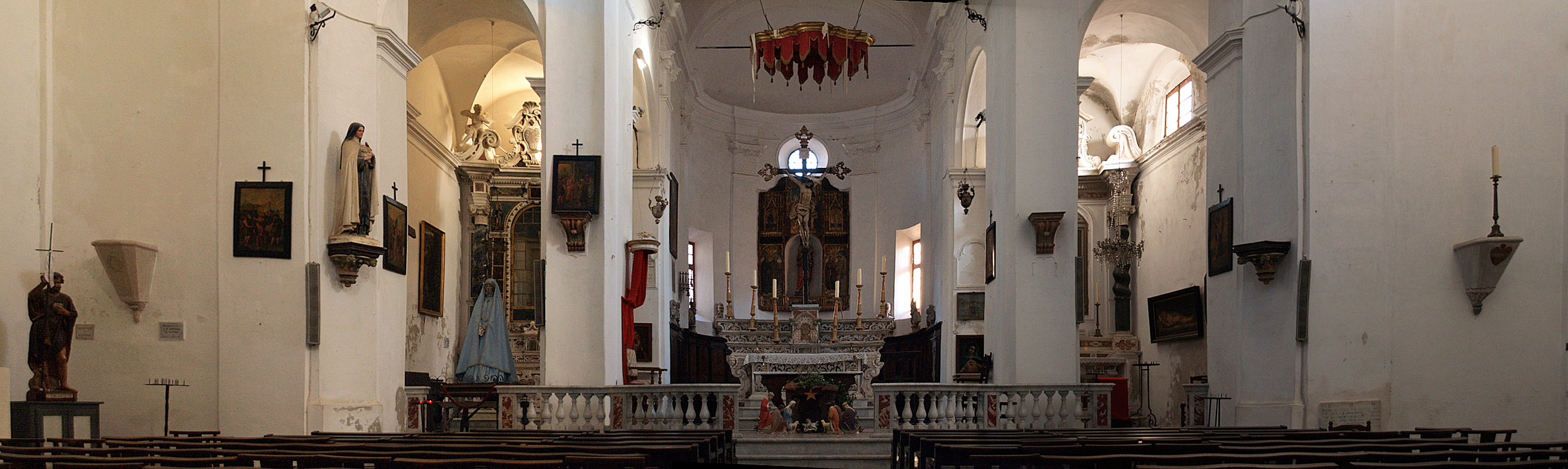 Calvi (Corsica) - Intérieur de la cathédrale Saint-Jean-Baptiste